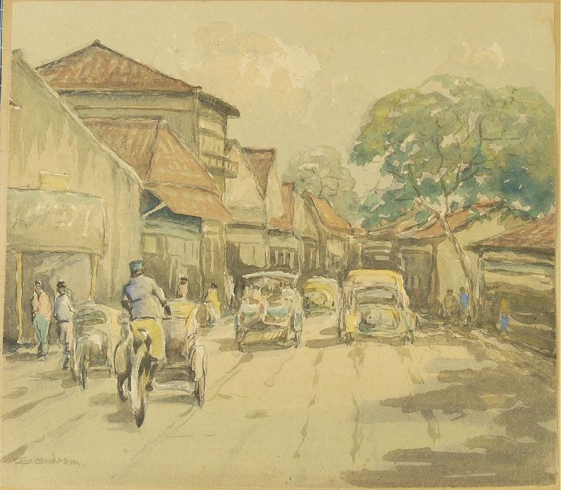 Aquarel. Schildering in waterverf. Linksonder gesigneerd: Soewardja. Voorstelling: straatscène met auto's en bedja's. Aan weerszijden van de weg huizen en voetgangers. De tekening is gelijmd op bruin papier.. Waterverfschildering van een straattafereel